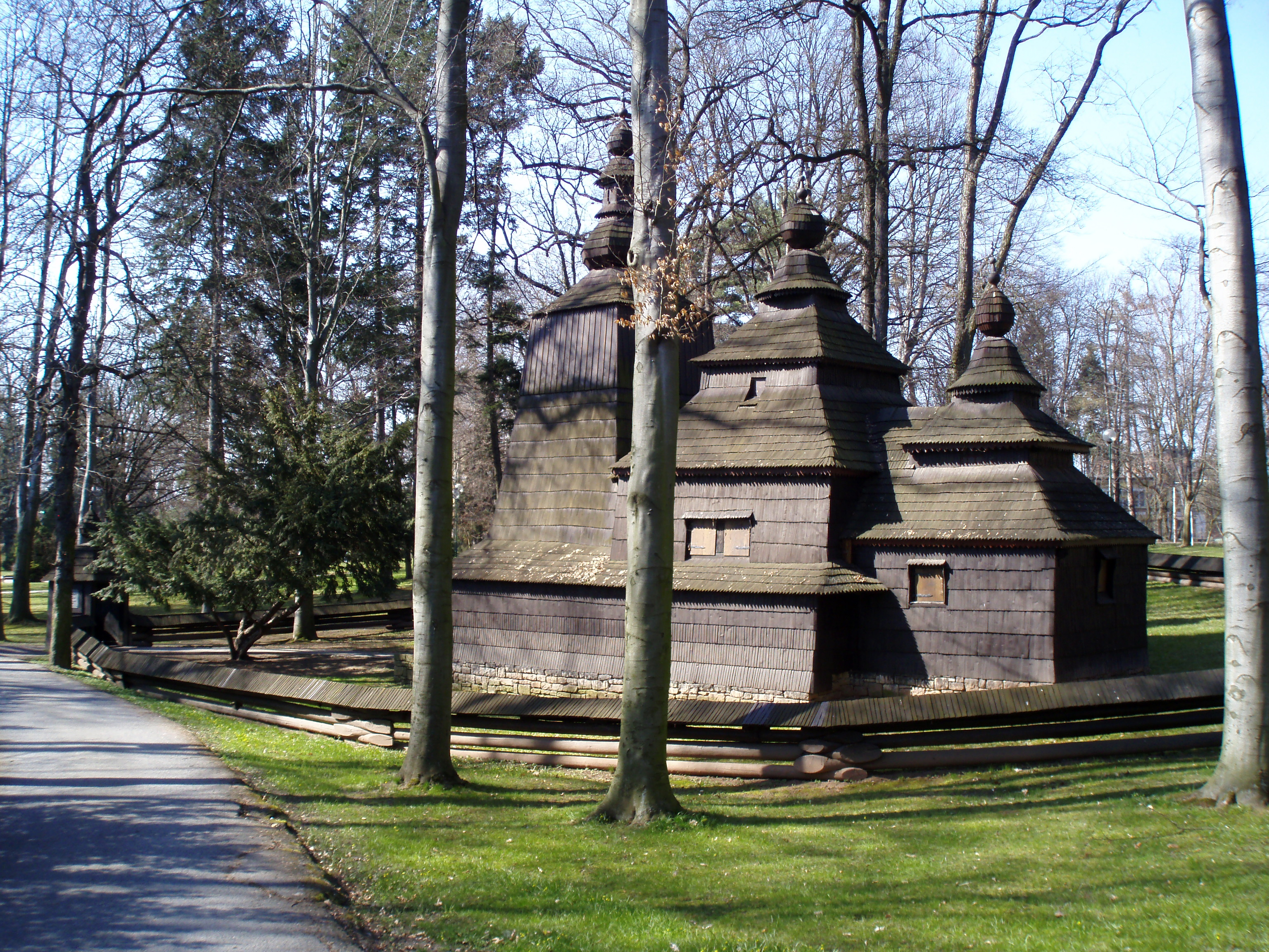 Kostelik sv. Mikuláse v Jiraskovych sadech